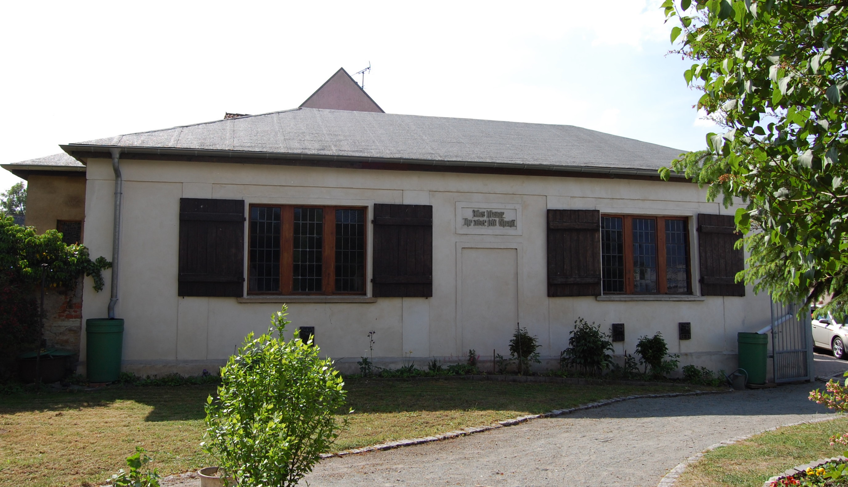 Gemeindesaal der Sankt-Stephanus-Gemeinde Magdeburg-Westerhüsen